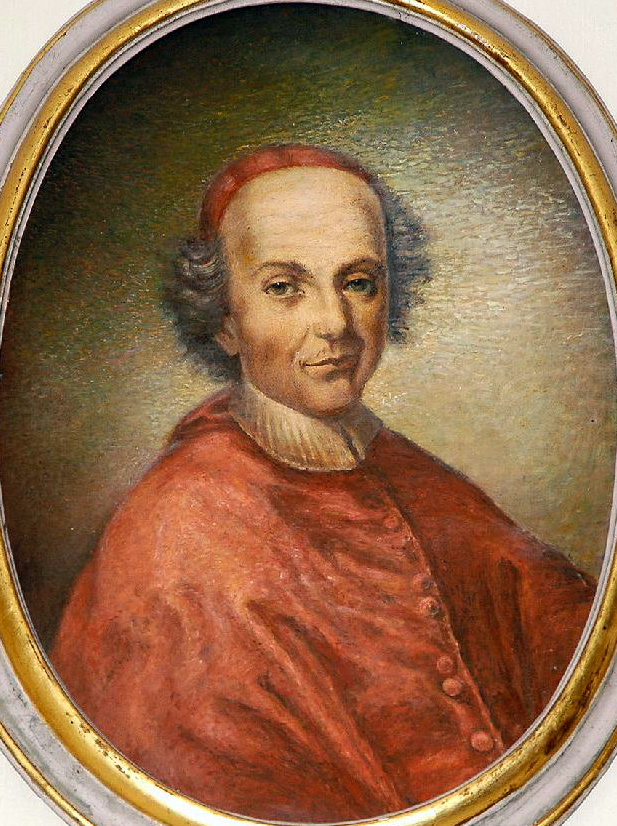 Ritratto di ecclesiastico (Lorenzo Fieschi), olio su tela